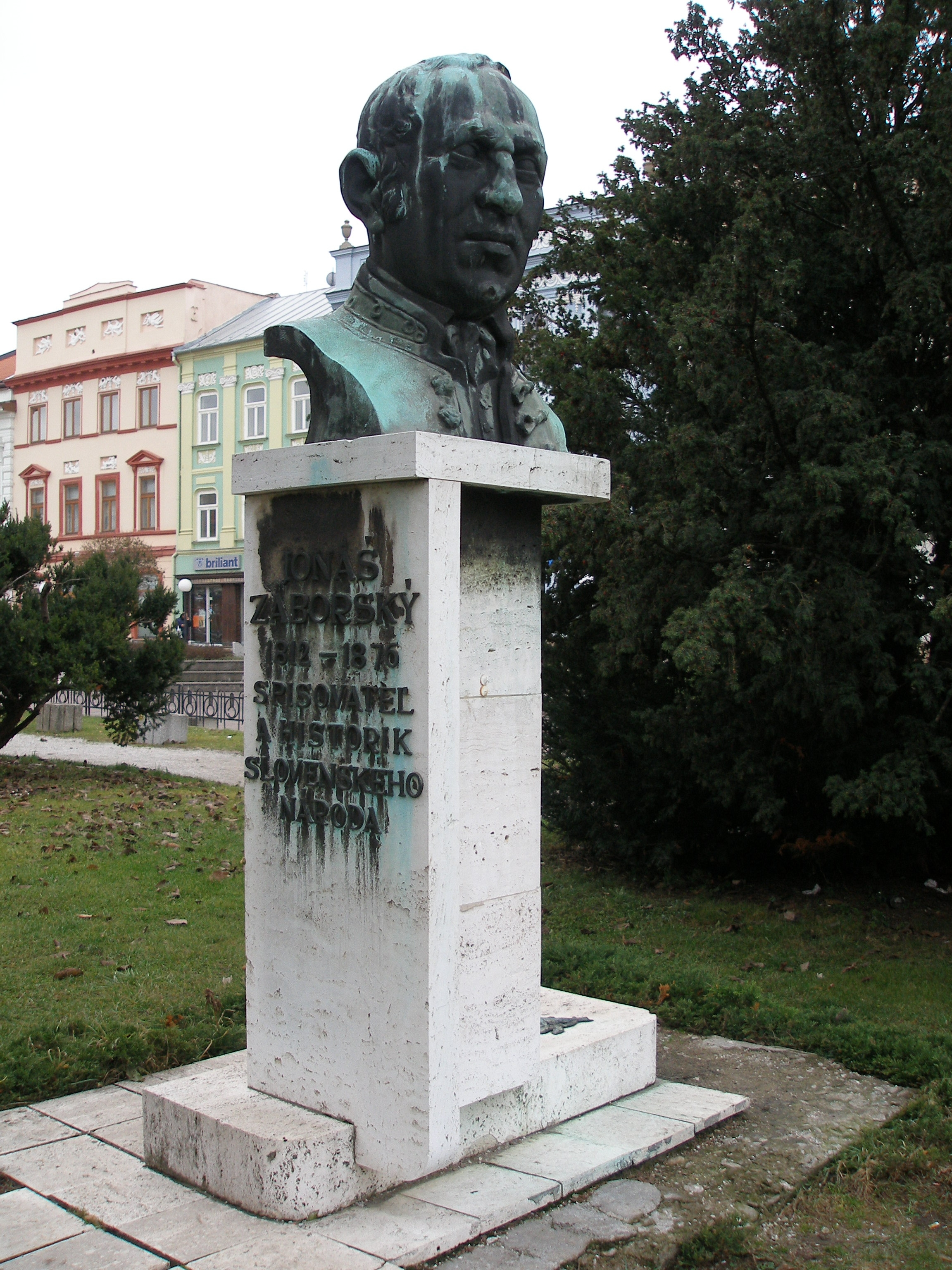 Prešov, busta Jonáša Záborského This medium shows the protected monument with the number 707-1453/0 (other) in the Slovak Republic.